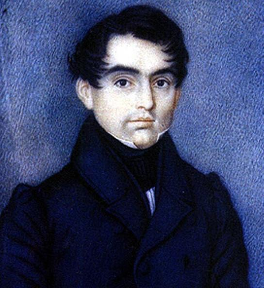 Manuel Francisco Aycinena y Pavon en la década de 1830.